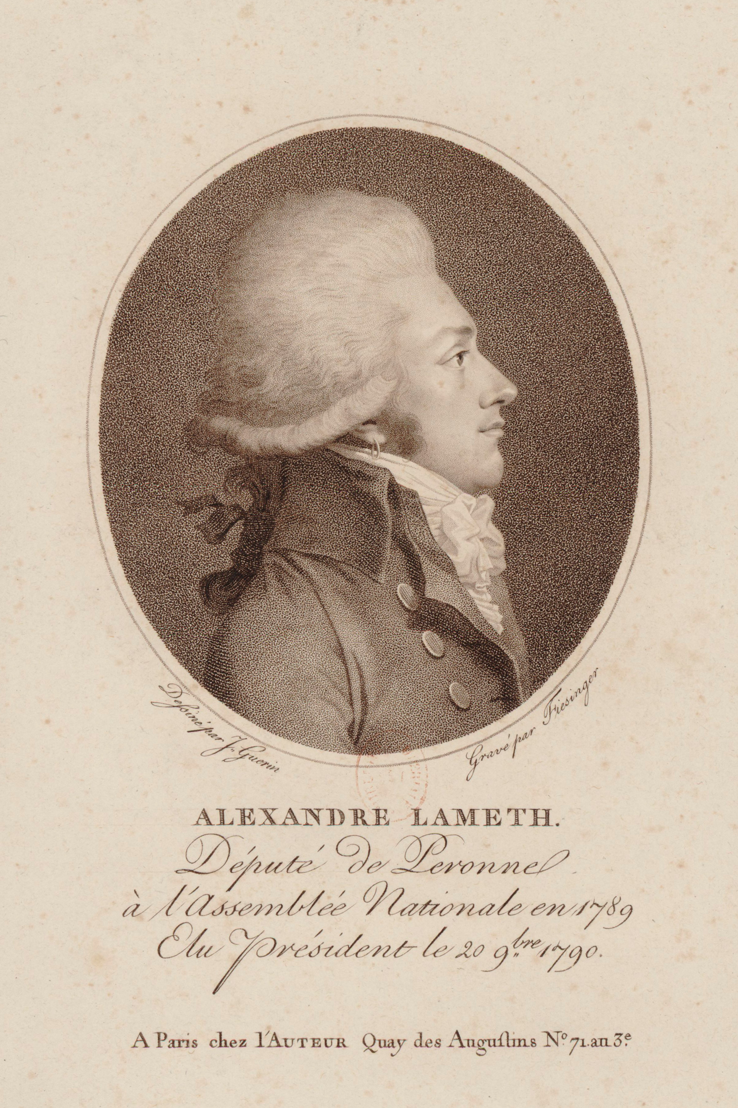 Portrait d'Alexandre Lameth, en buste, de profil dirigé à droite dans une bordure ovale (estampe).